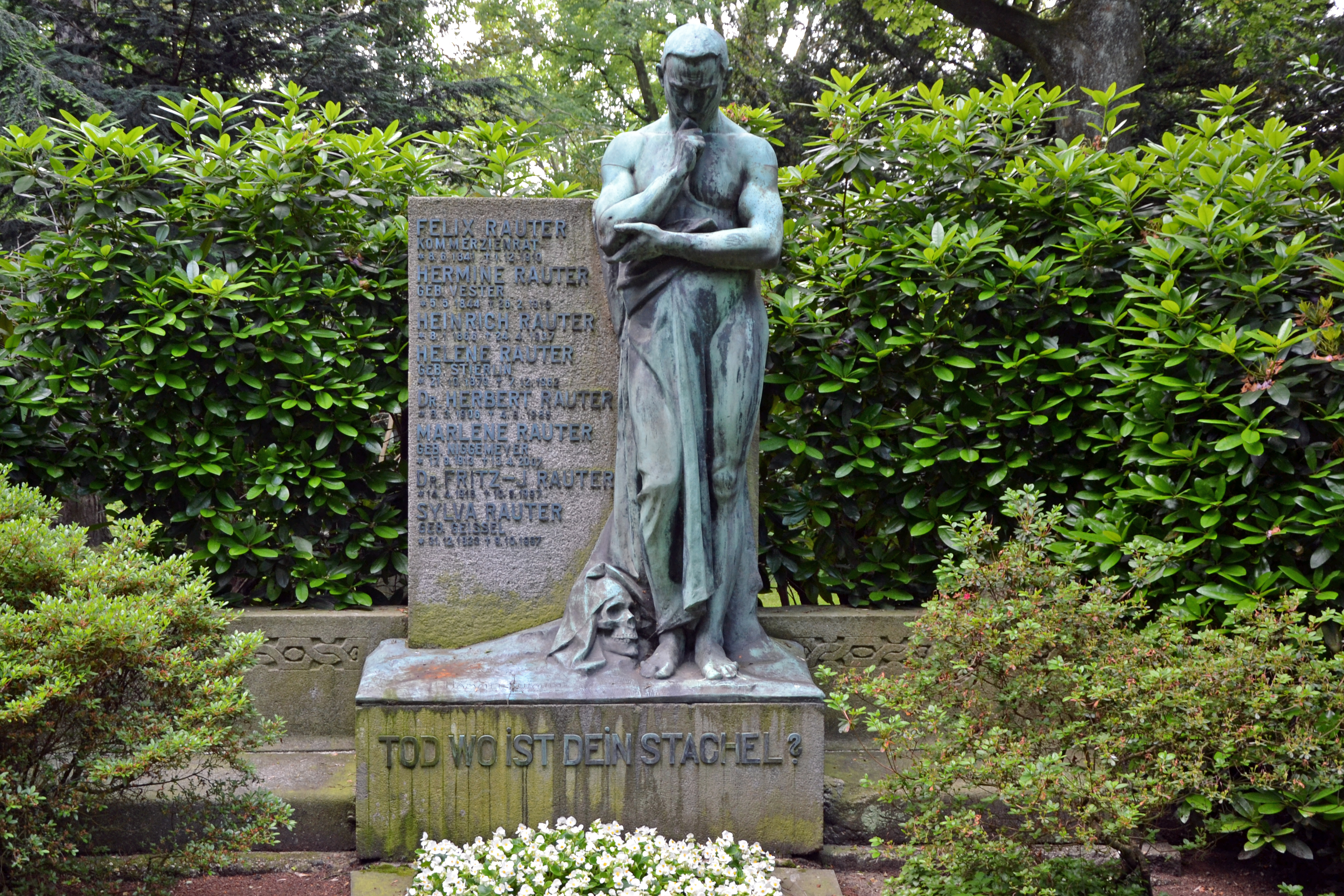 Grabmal der Familie Rauter in Essen; ursprünglich auf dem Friedhof am Kettwiger Tor, seit dessen Schließung 1955 auf dem historischen Gräberfeld des Ostfriedhofs